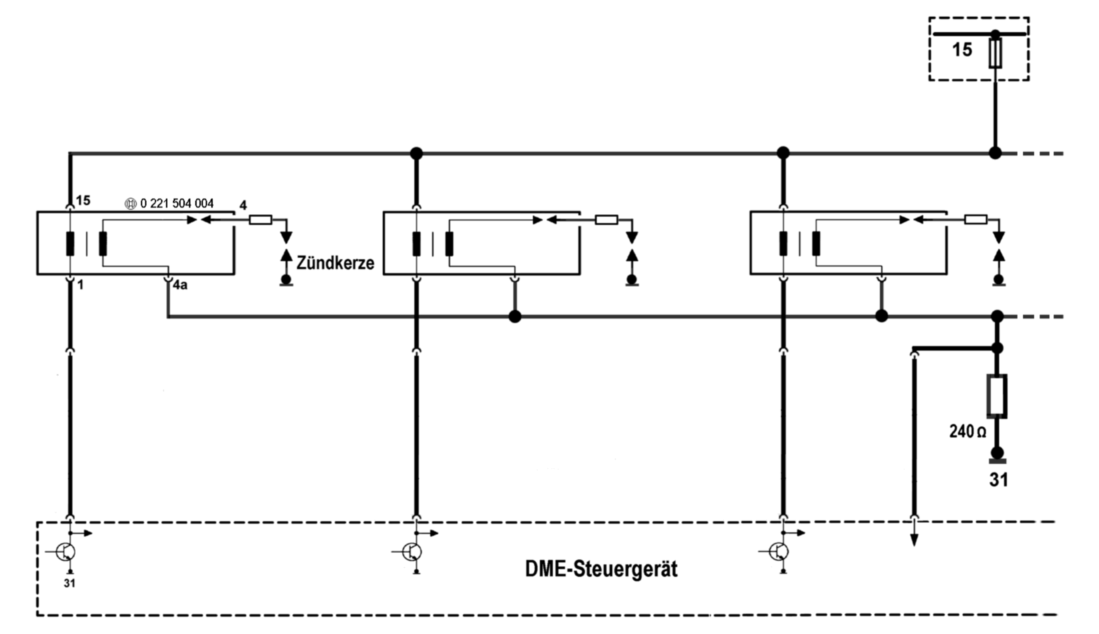 Zündkreis eines Ottomotors mit Einzelzylinder-Zündspulen